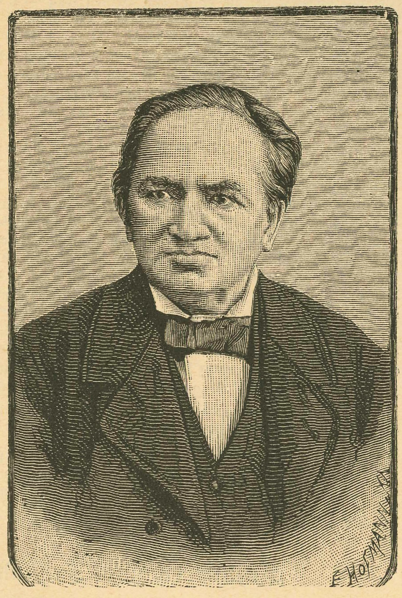 Drei Württemberger. In: Katholischer Volks- und Hauskalender, Stuttgart 1887, S. 37